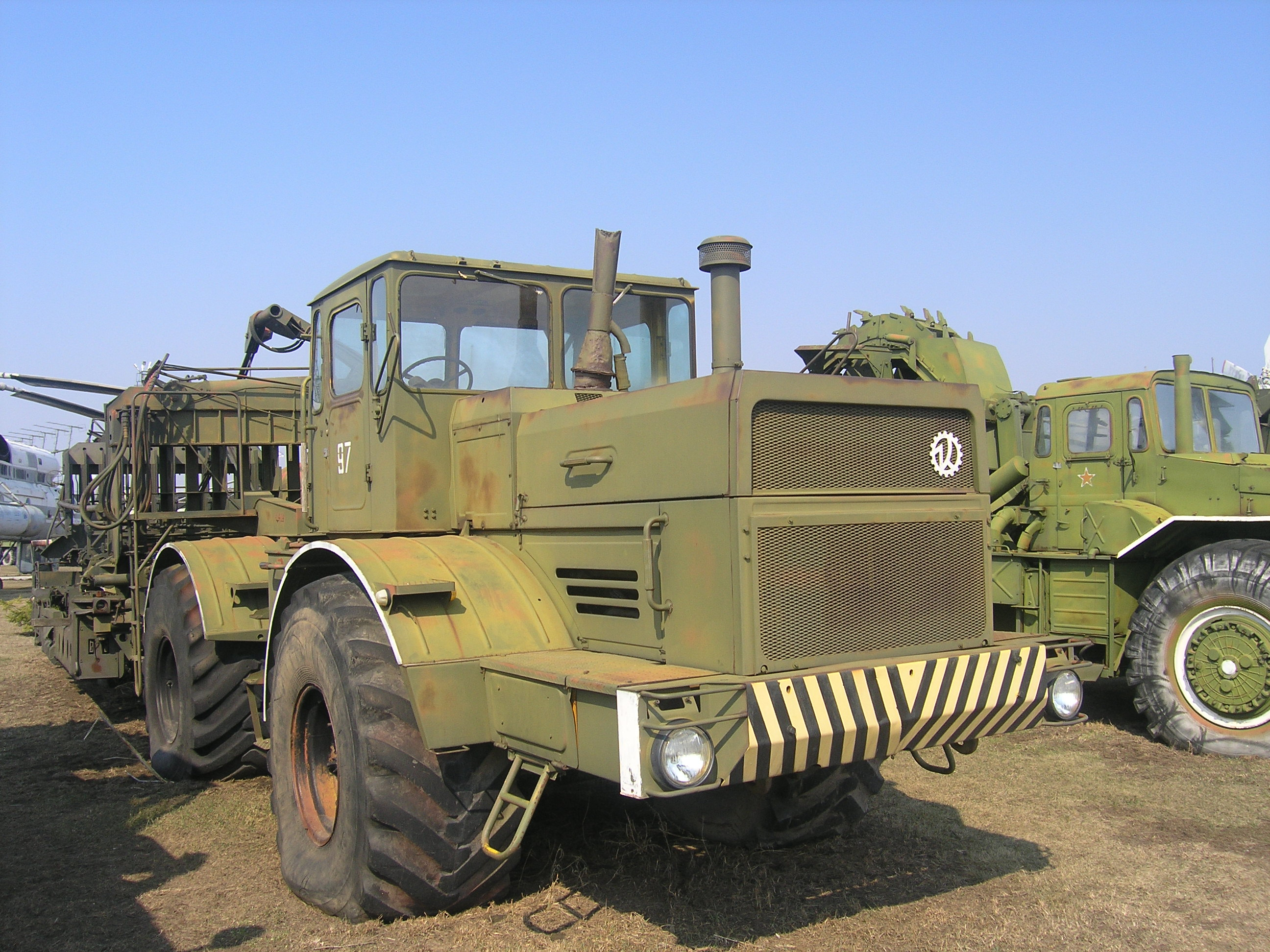 Трубоукладочная машина ТУМ-150В с тягачом трактором К-701 "Кировец" для монтажа комплекта полевого магистрального трубопровода длиной 150км.